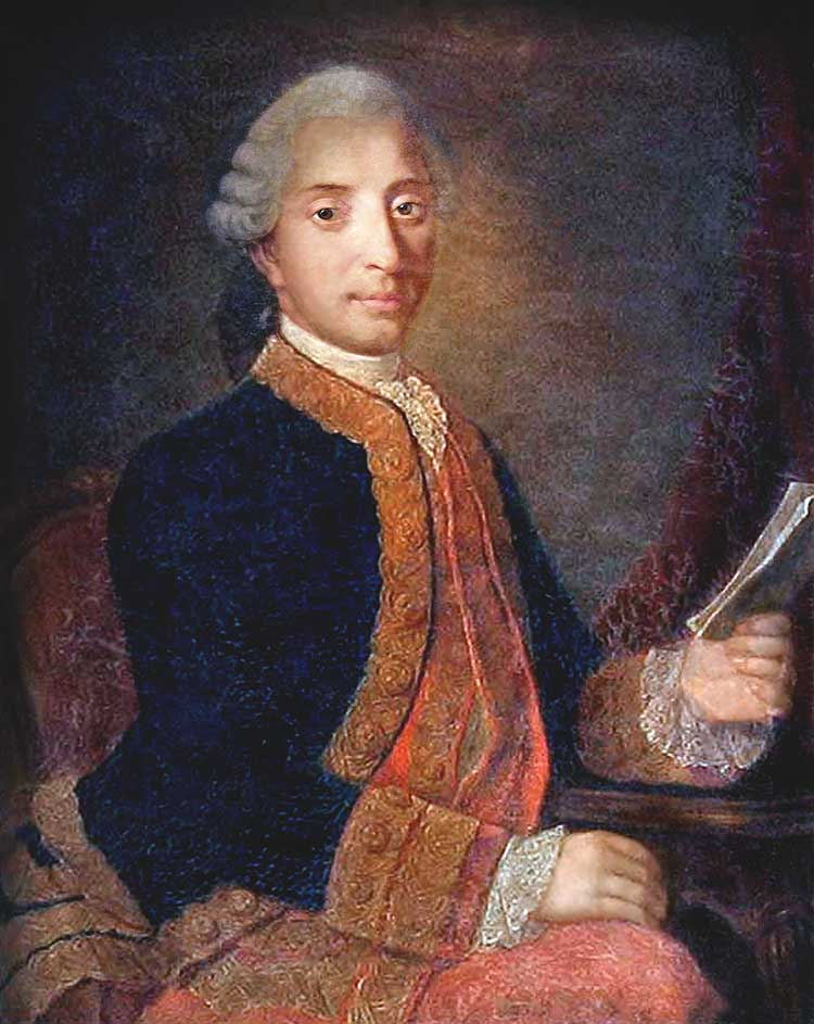 Arnaud II de La Porte